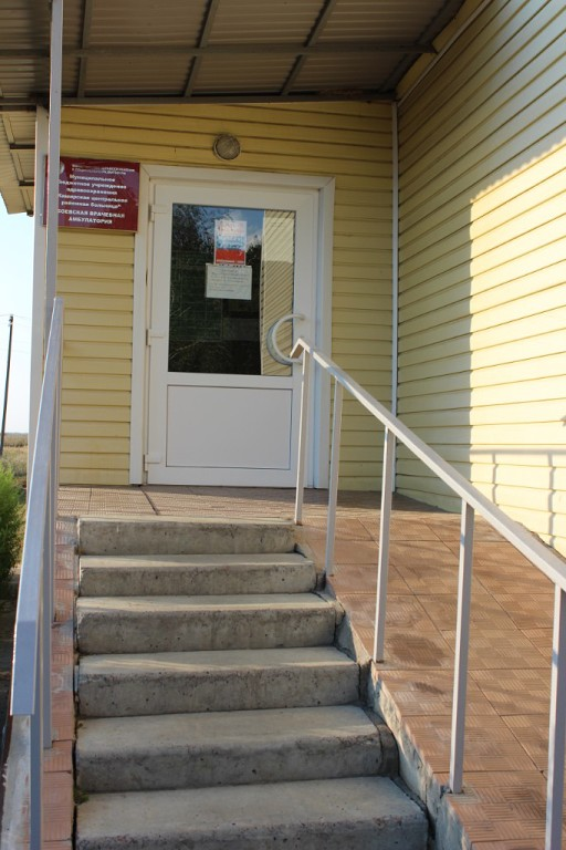 Боевский ФАП